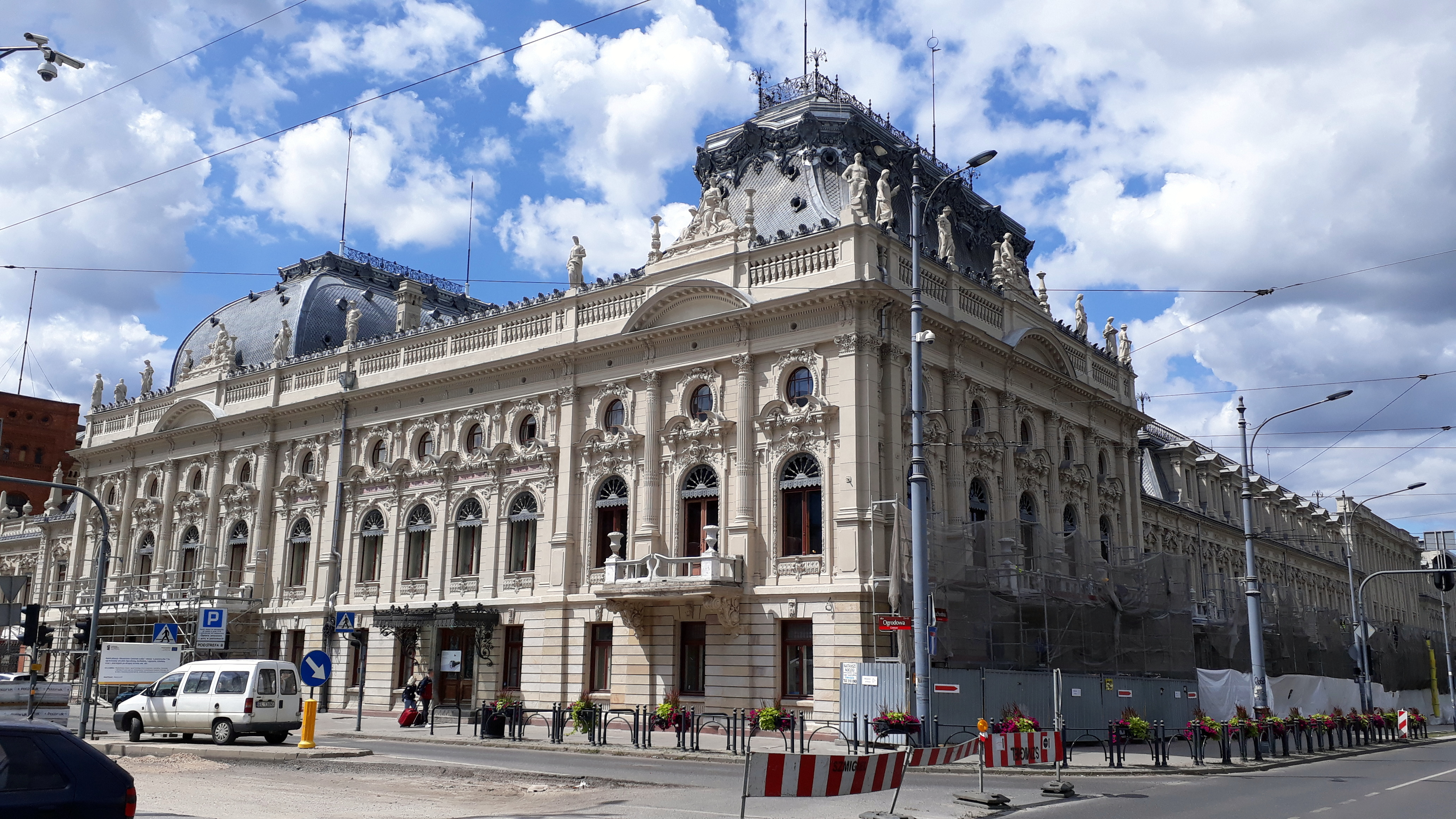 Muzeum miasta Łodzi